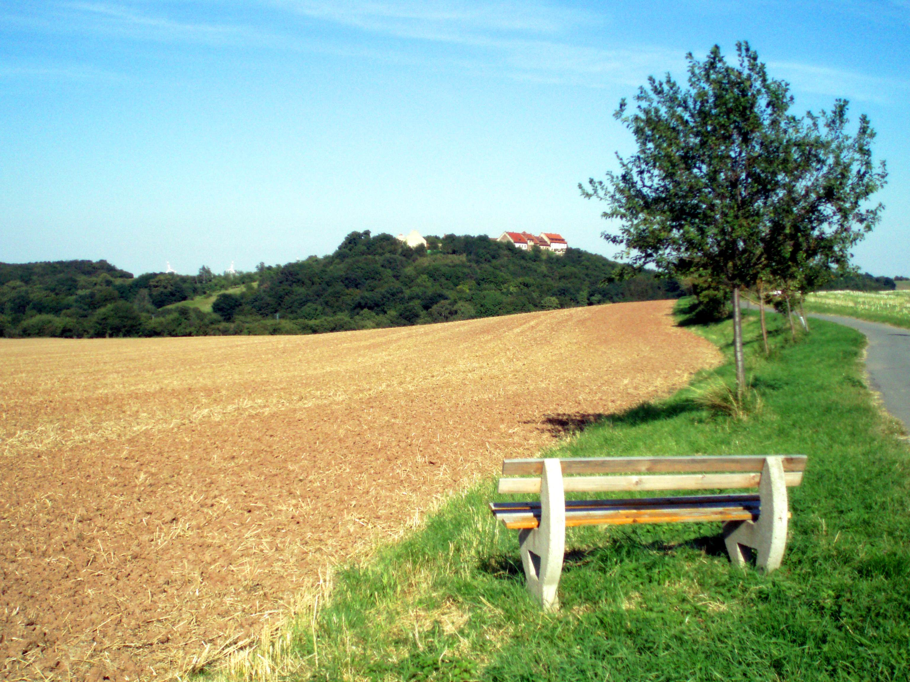 Blick zur Konradsburg